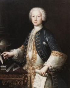 M. le comte Patrice d'Arcy, membre de l'Académie royale des sciences.